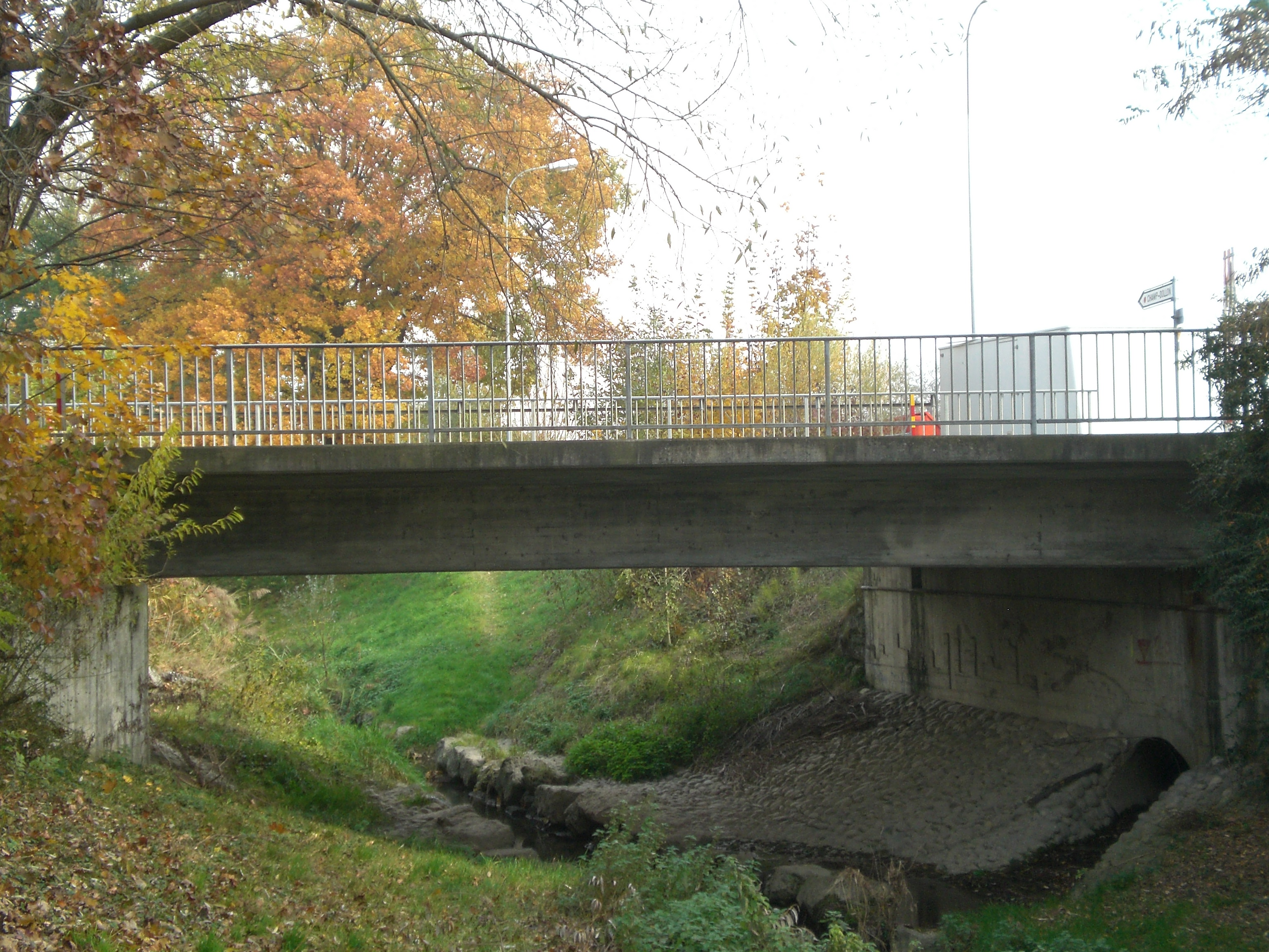 Pont Bochet sur la Seymaz